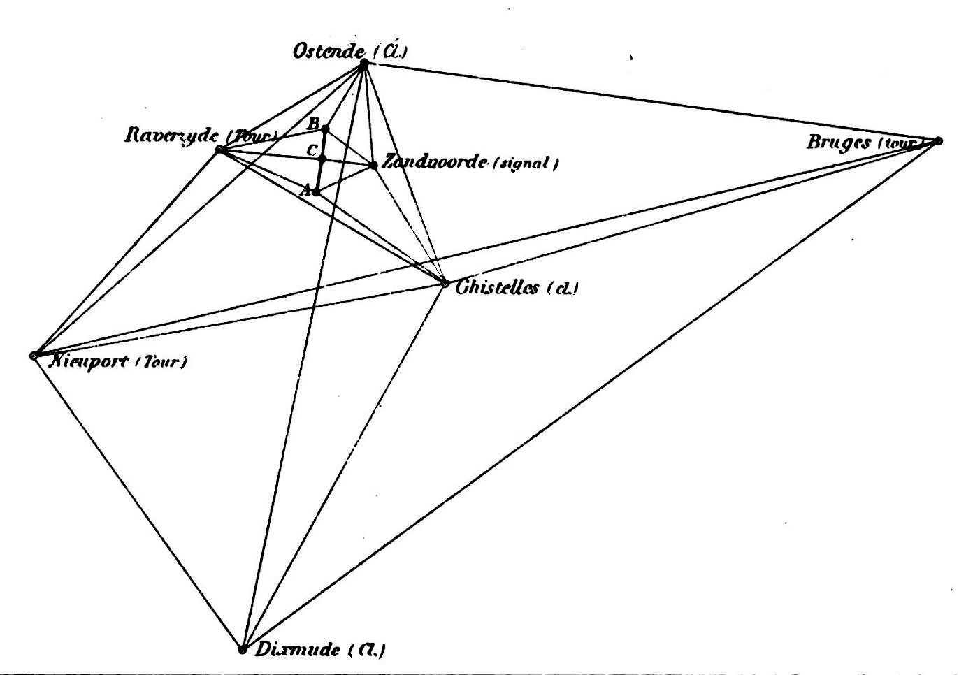 Schema uit 1867 van de Geodetische Basis van Oostende gemeten in 1853.